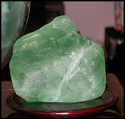 fluorite, 螢石